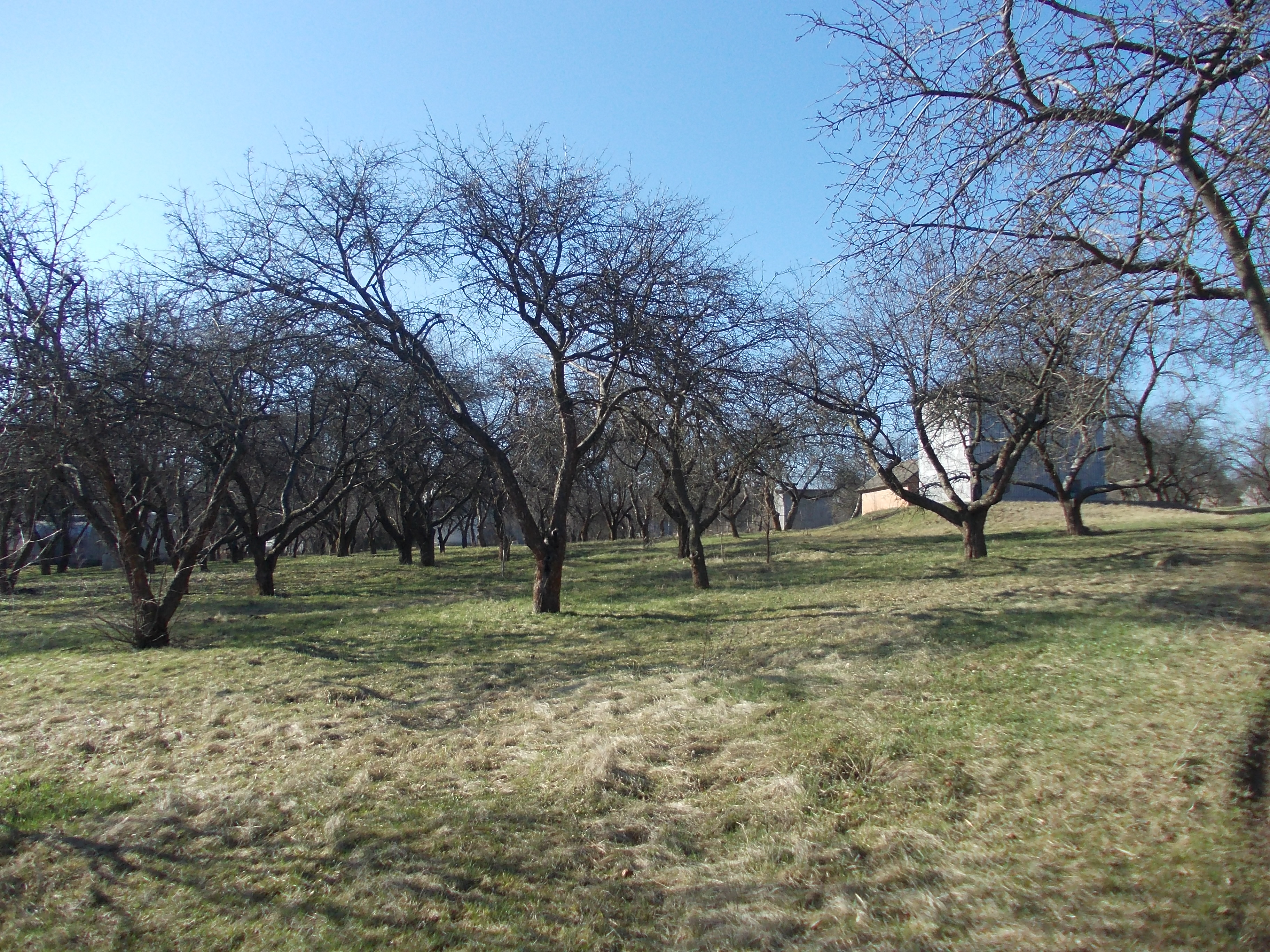 Місто Полтава. Територія Полтавської гравіметричної обсерваторії. Яблуневий сад навесні.